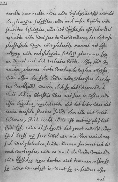 Een bladzijde uit het enige handschrift met Brief uit de ballingschap (Gent, ub, 3854, blz. 221) van Alijt Bake